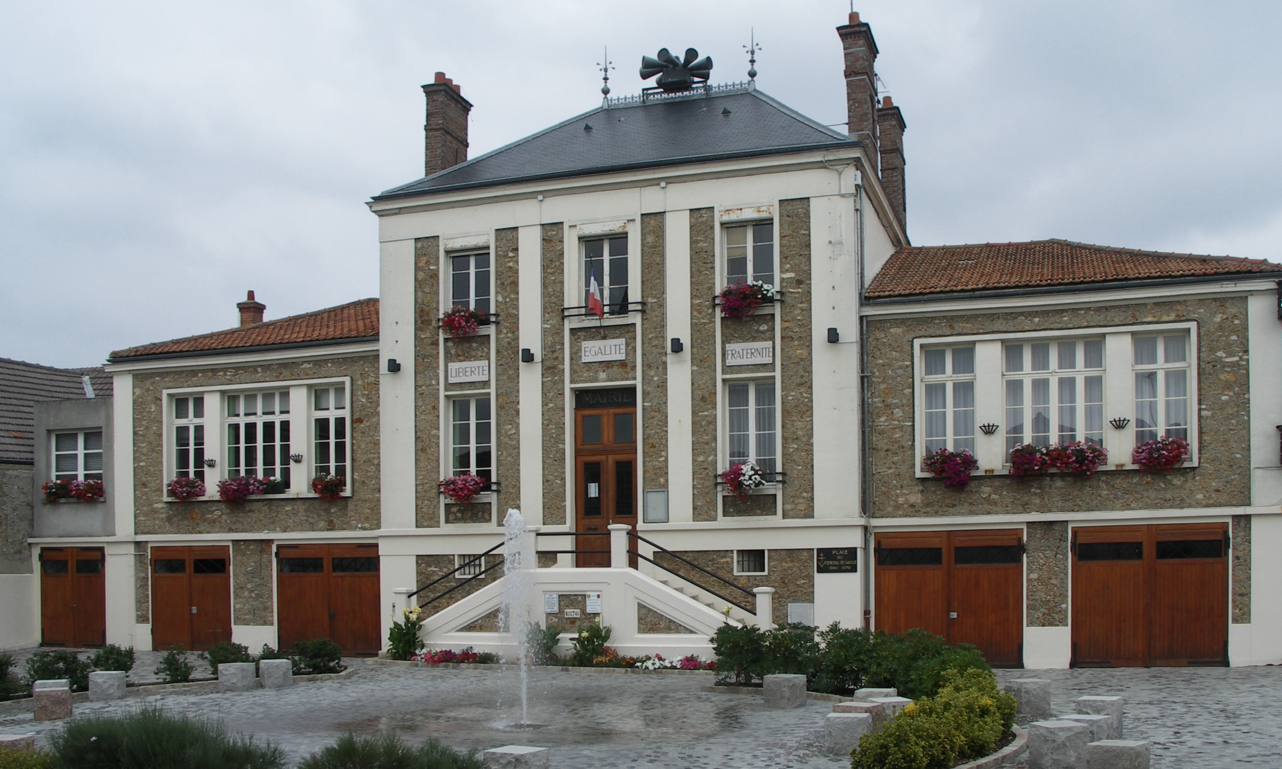 Hôtel de Ville de La Ville-du-Bois (Essonne, France).